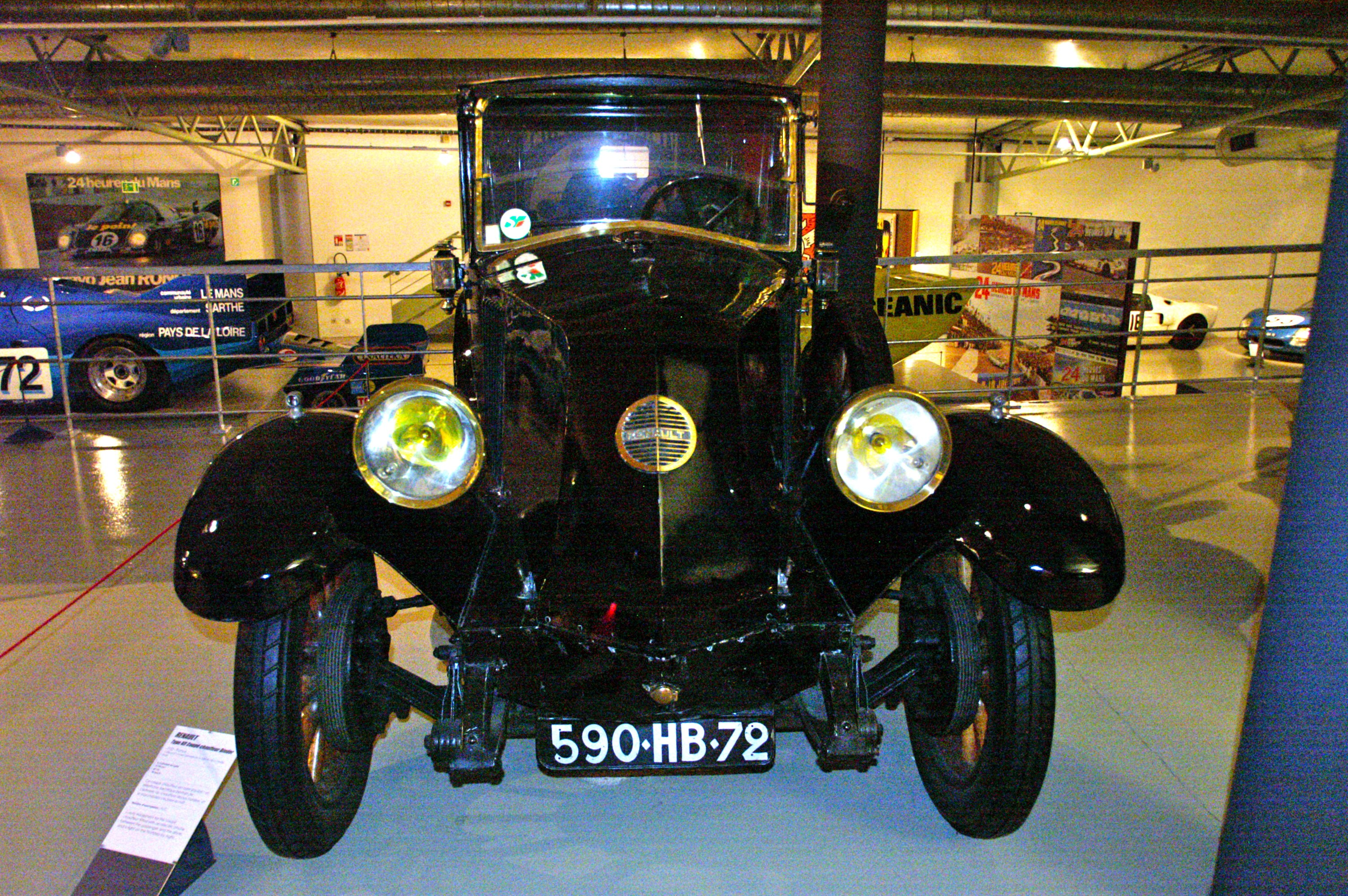 Le Musee des 24 Heures